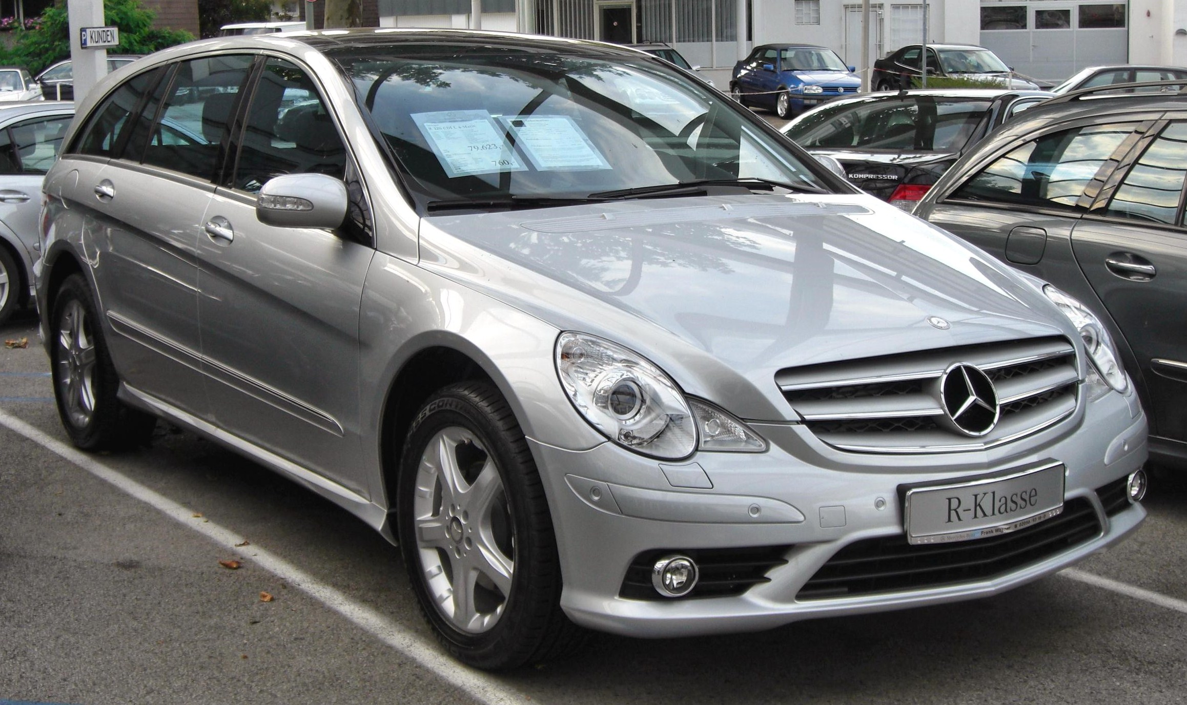 Mercedes R-Klasse